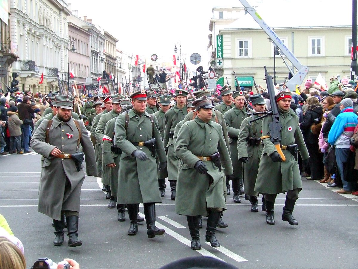 Powstanie wielkopolskie, reconstruction